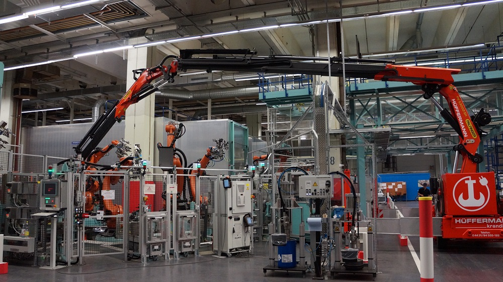 Roboterwechsel mit Elektrokran